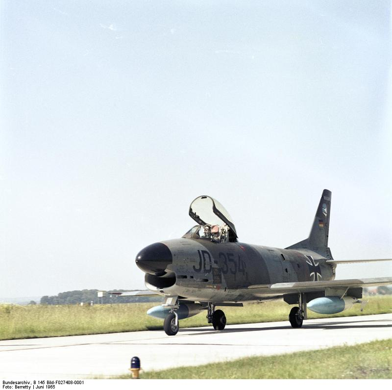 Reportage Bundeswehr: JG 74 (Jagdgeschwader)